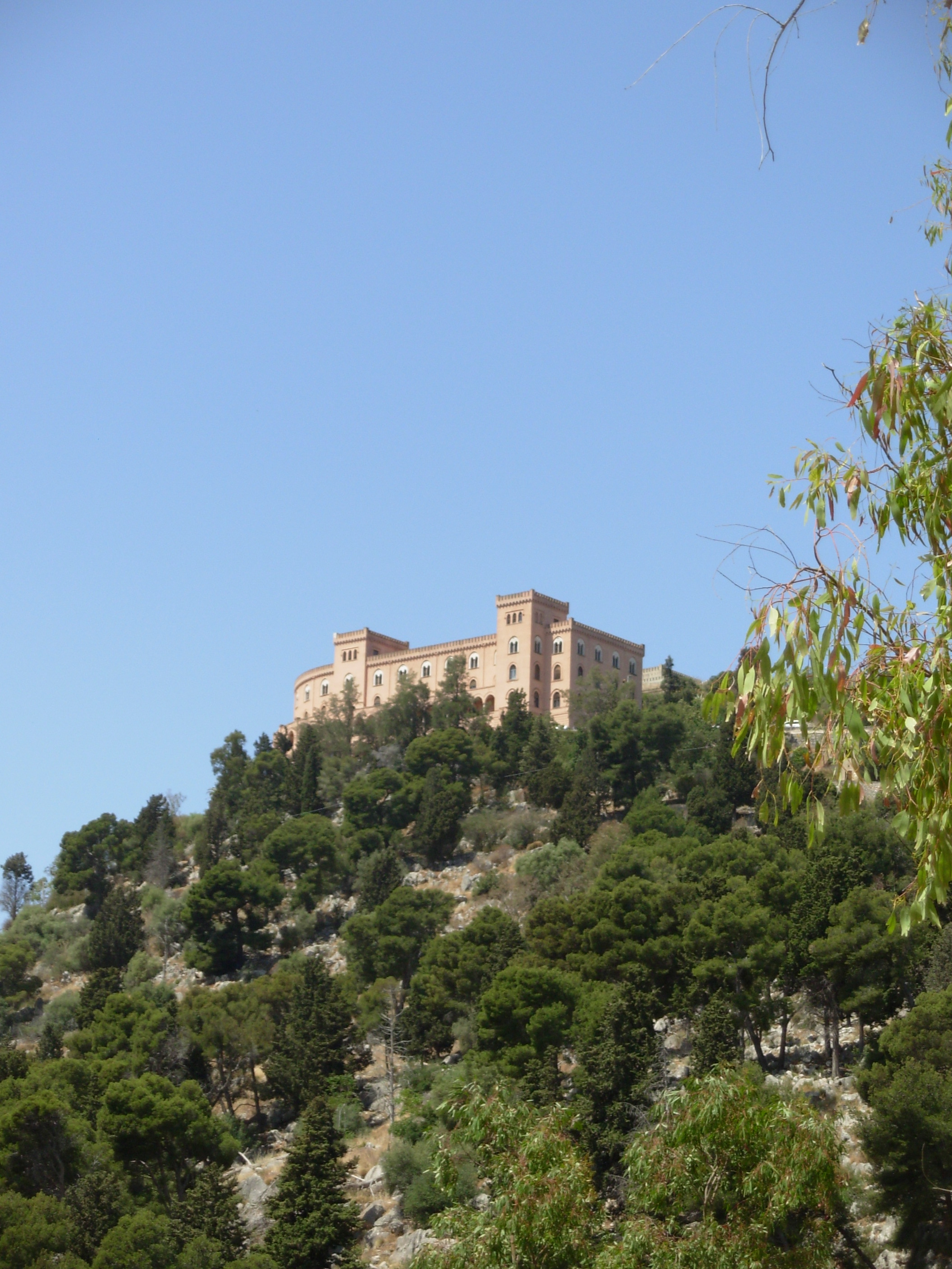 by Hszeee